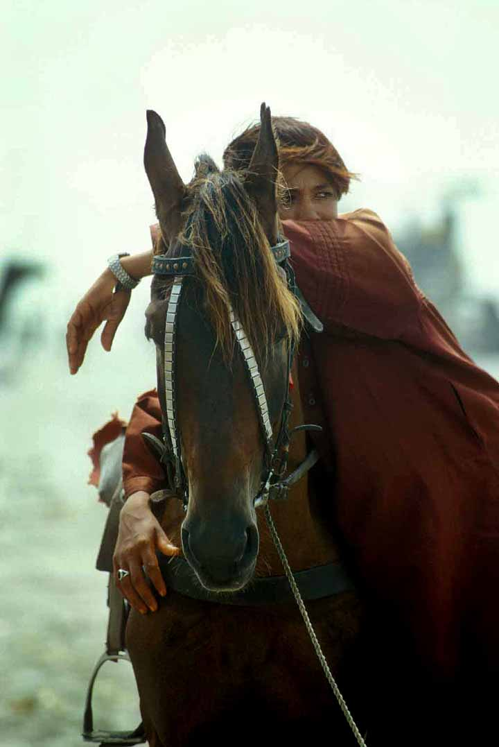 Pakistani horse rider.jpg 11.